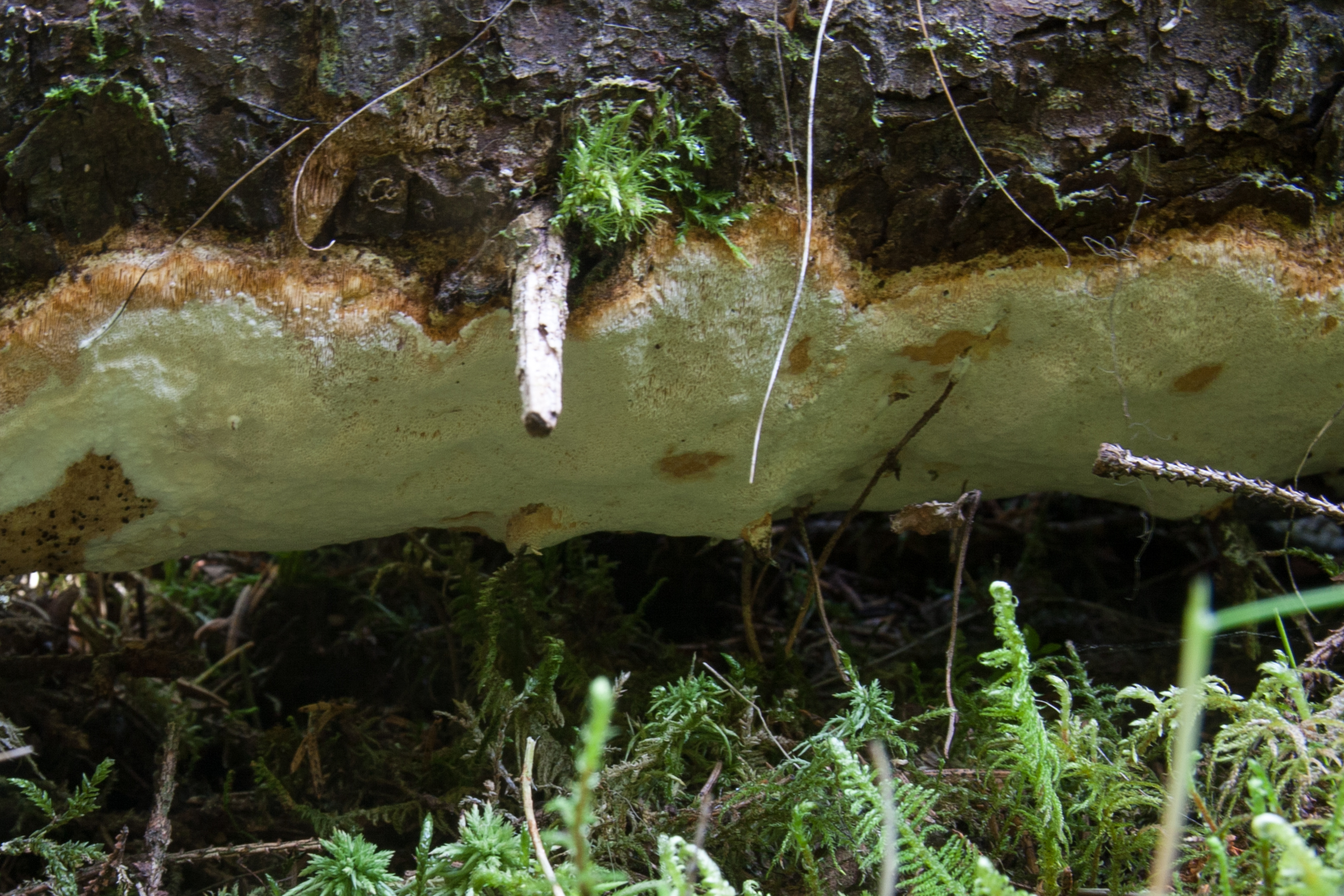 Gräddticka